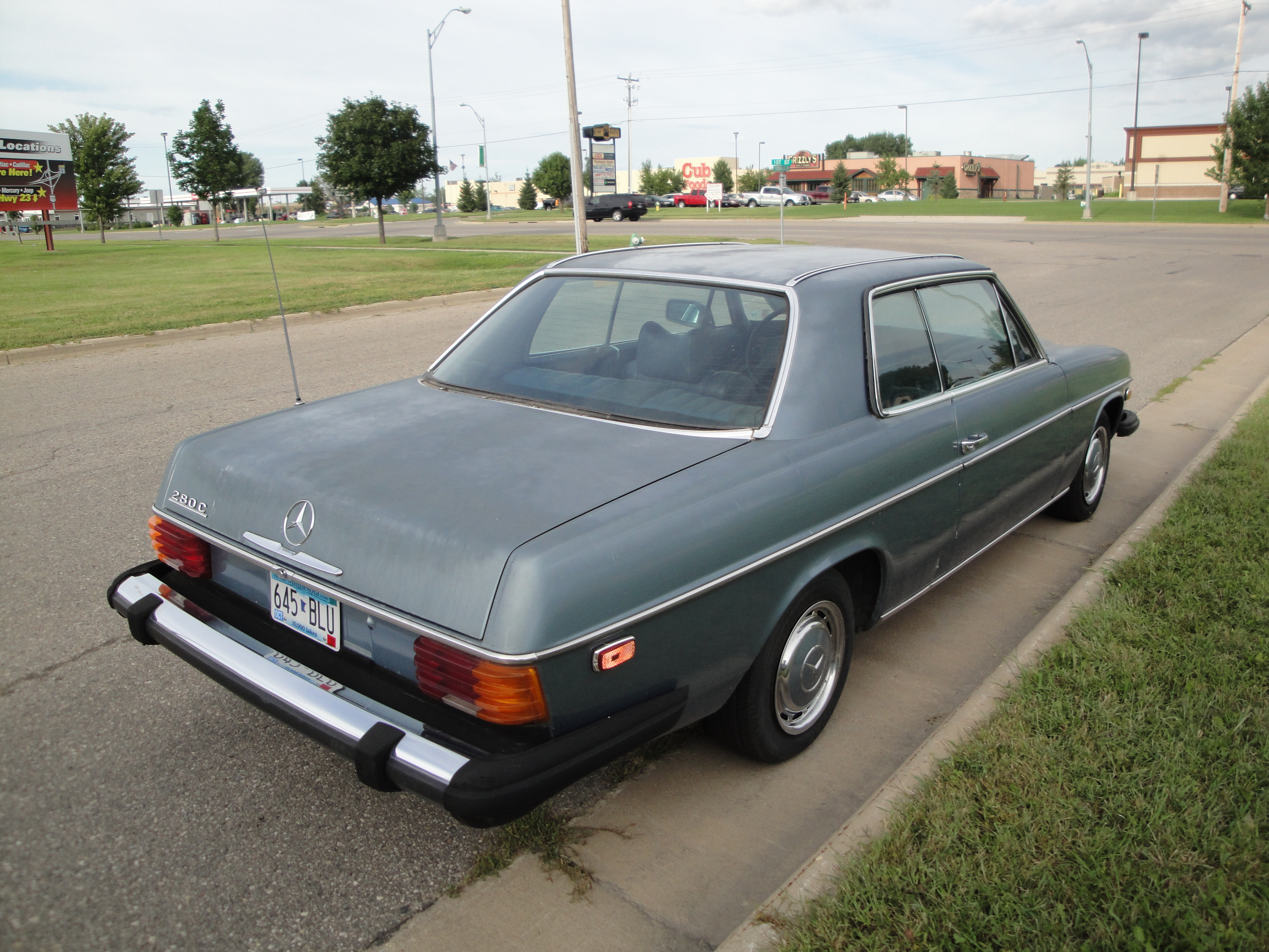 76 Mercedes 280C